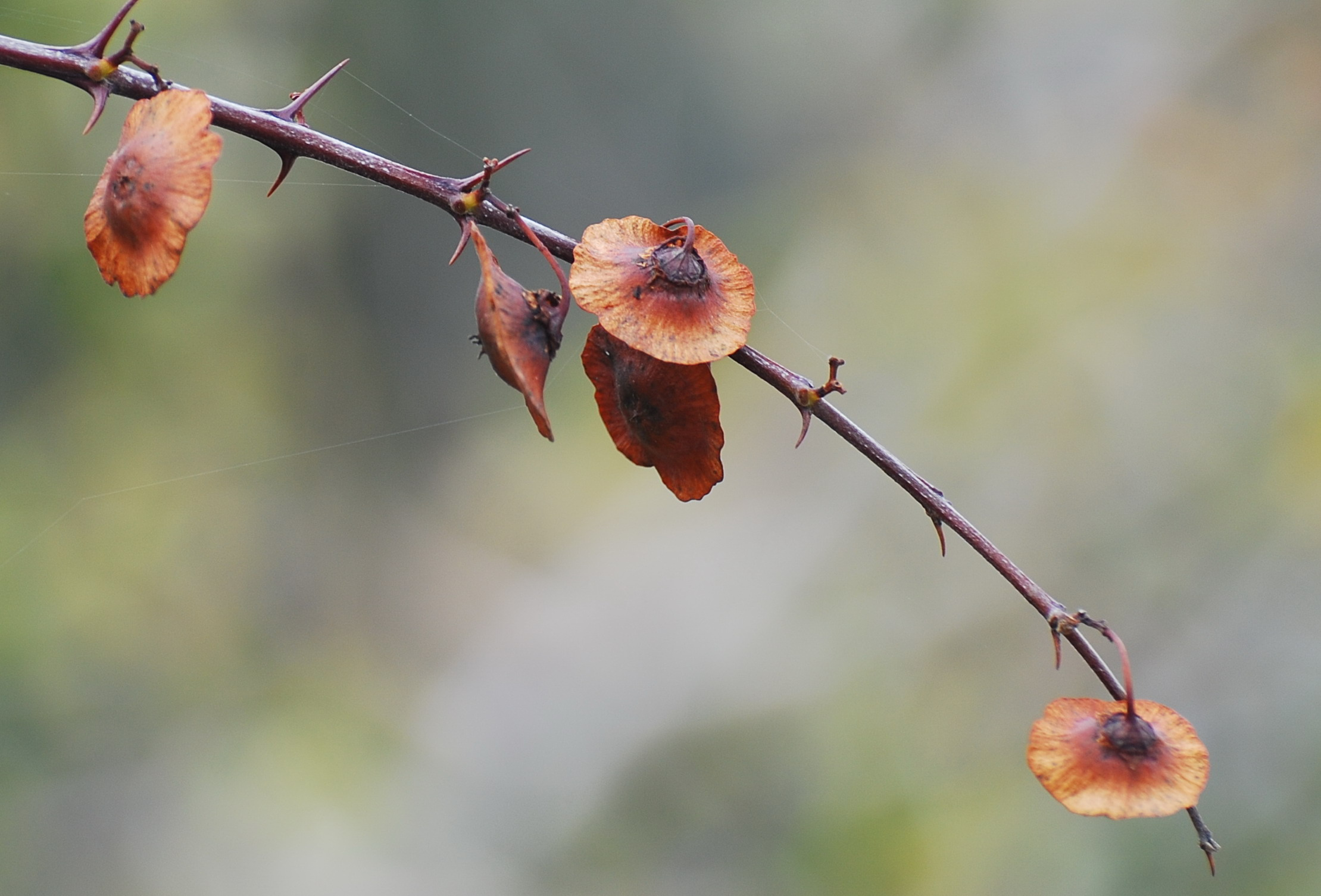 Paliurus spina-christi fruit, İzmir, Turkey